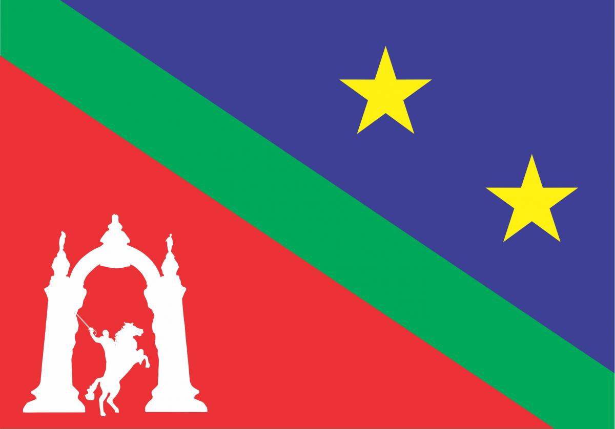 Bandera Oficial del Municipio Libertador del Estado Carabobo